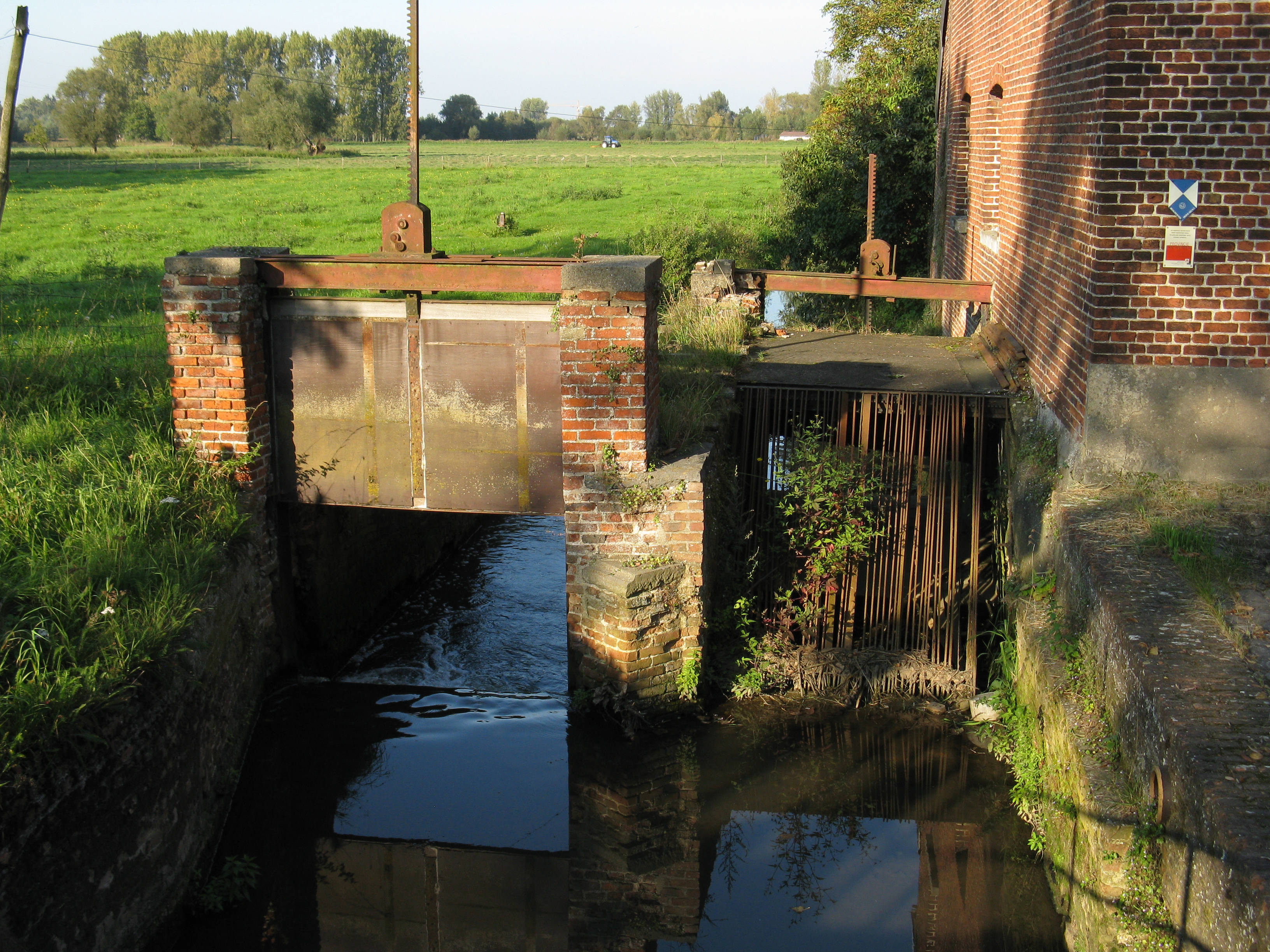 De sluis van de Schemelbertmolen in de Molenbeek, Liezele, Puurs, Antwerpen, BelgiëUnknown